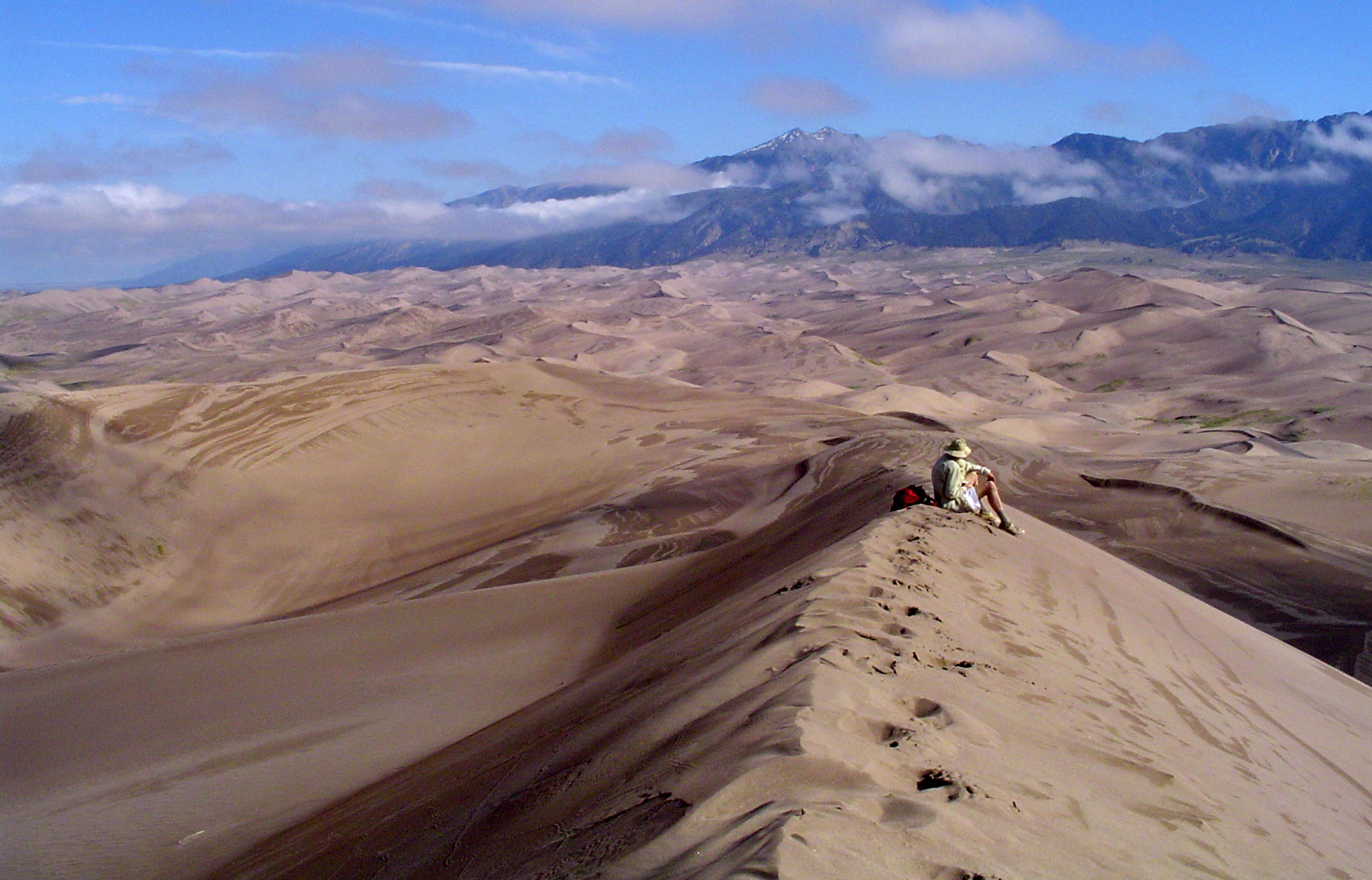 NPS/Scott Hansen